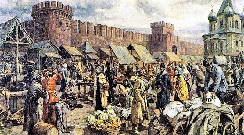 Торг в Туле